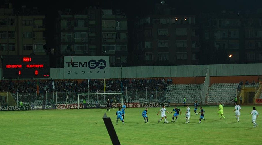 Adana Demirspor - Alanya Spor 31 Ağustos TFF 2 Lig 2 Klasman ilk maç. Adana Demirspor - Alanya Spor 31 Ağustos TFF 2 Lig 2 Klasman ilk maç. Adana Demirspor - Alanya Spor 31 Ağustos TFF 2 Lig 2 Klasman ilk maç.